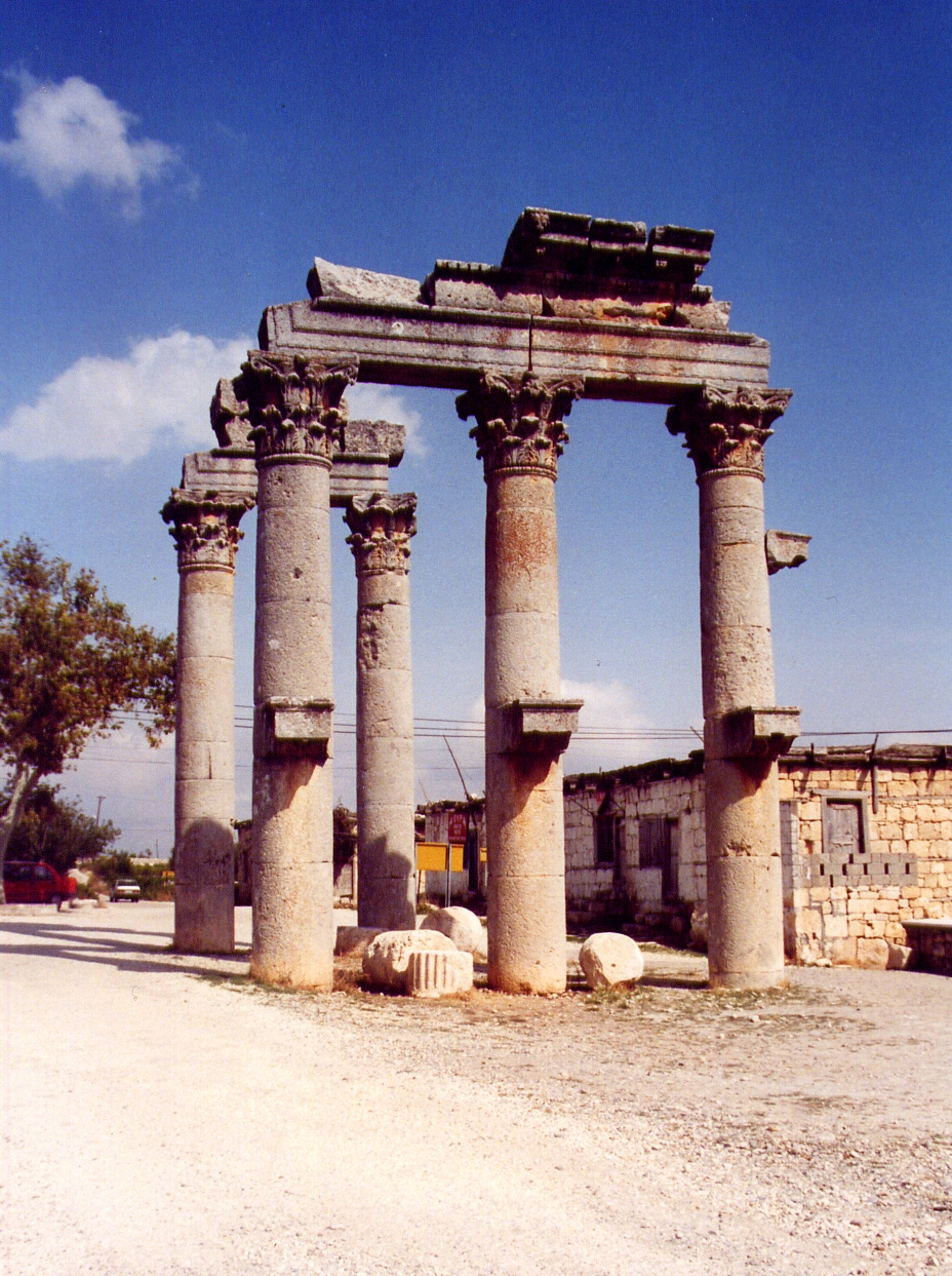 Prunktor, Diokaisareia/Uzuncaburc, Türkei